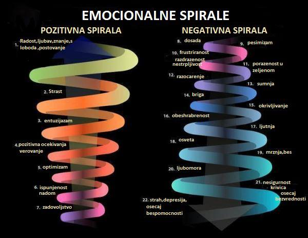 Pozitivne i negativne misli